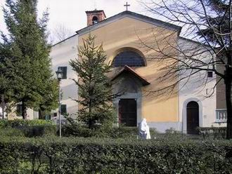 San martino a paperino